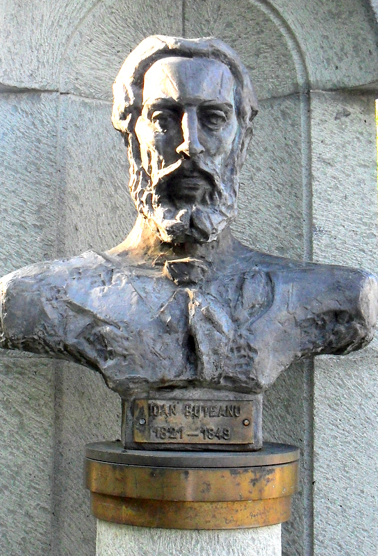 Baia Mare, popiersie Ioana Buteanu (1821-1849)